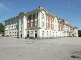 Heikkilän kasarmialueen rakennus nro 1 Heikkilän kasarmialueen rakennus nro 1